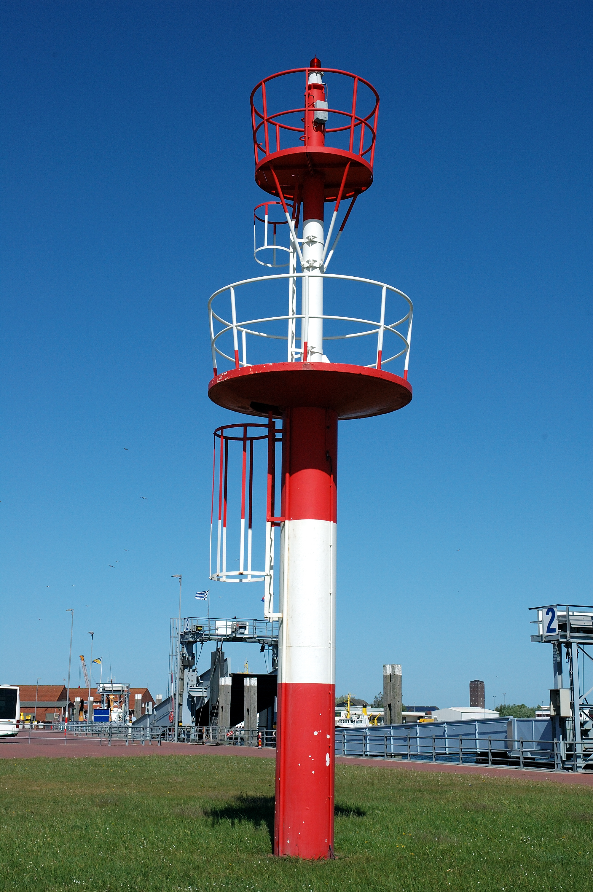 Molenfeuer im Hafen von Norderney